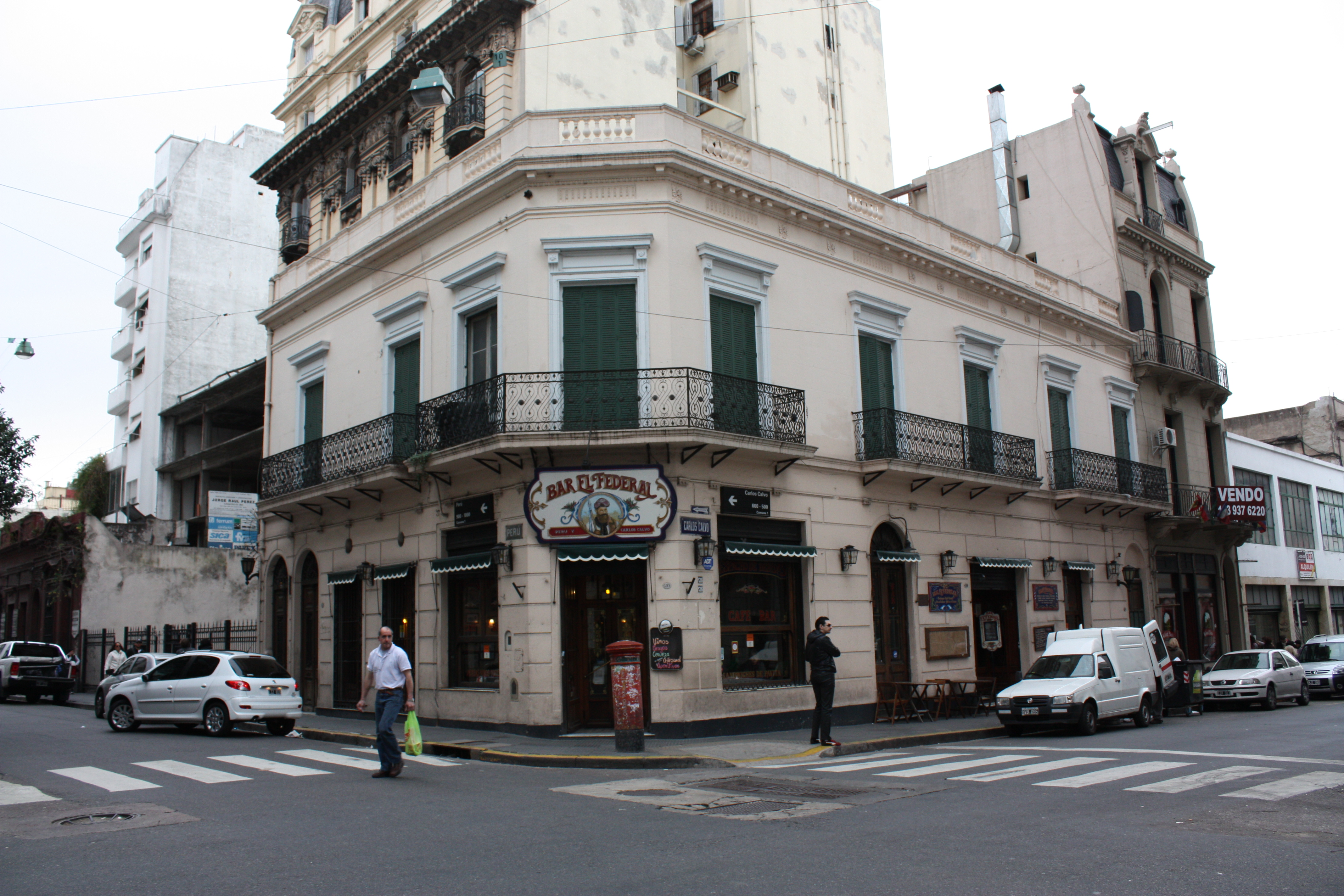 Bar El Federal